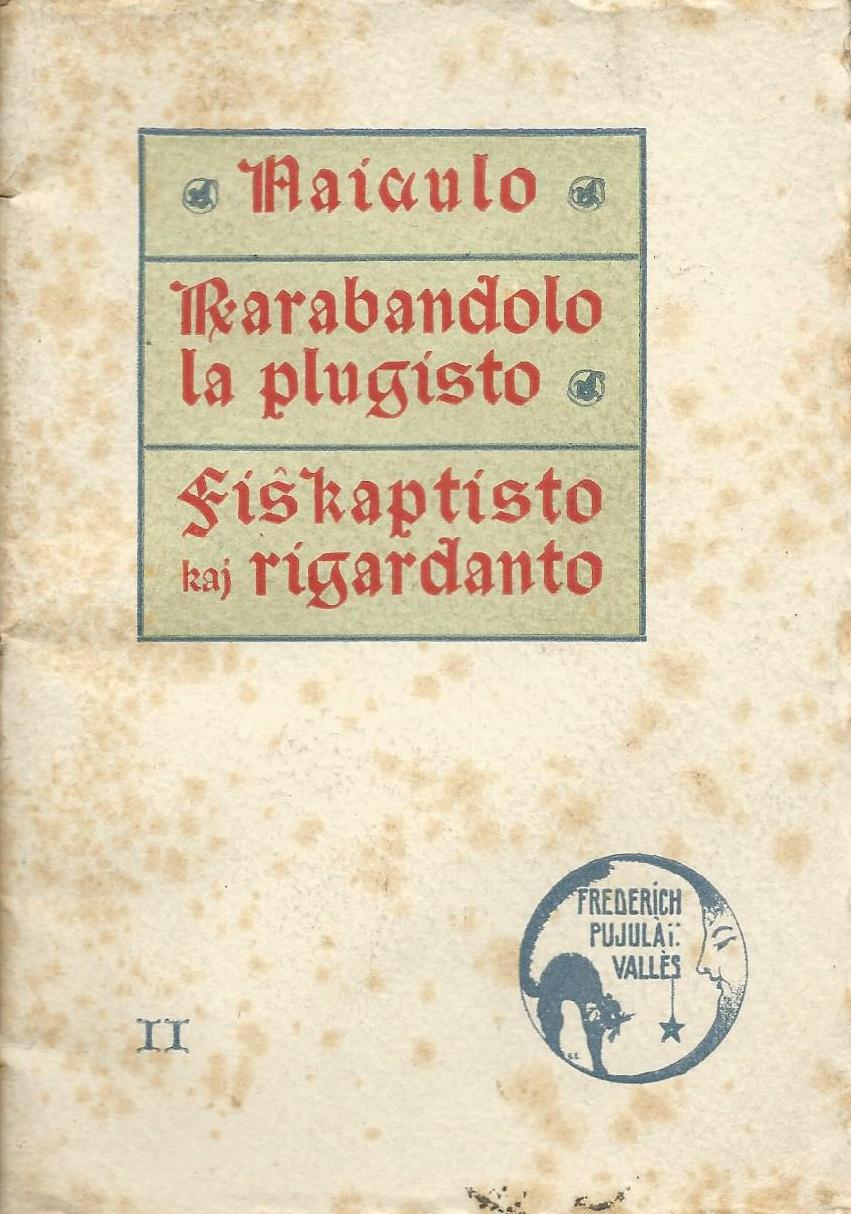 librokovrilo de "Naivulo"